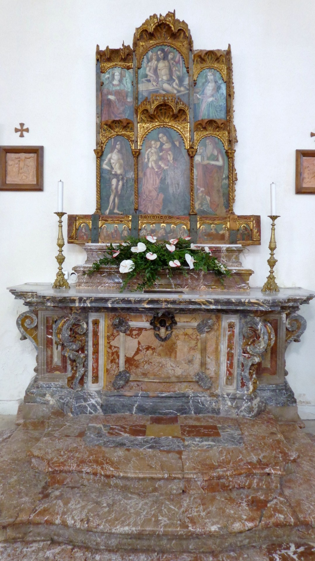 Polittico, Antonello de Saliba, cattedrale di San Nicola di Bari, Taormina